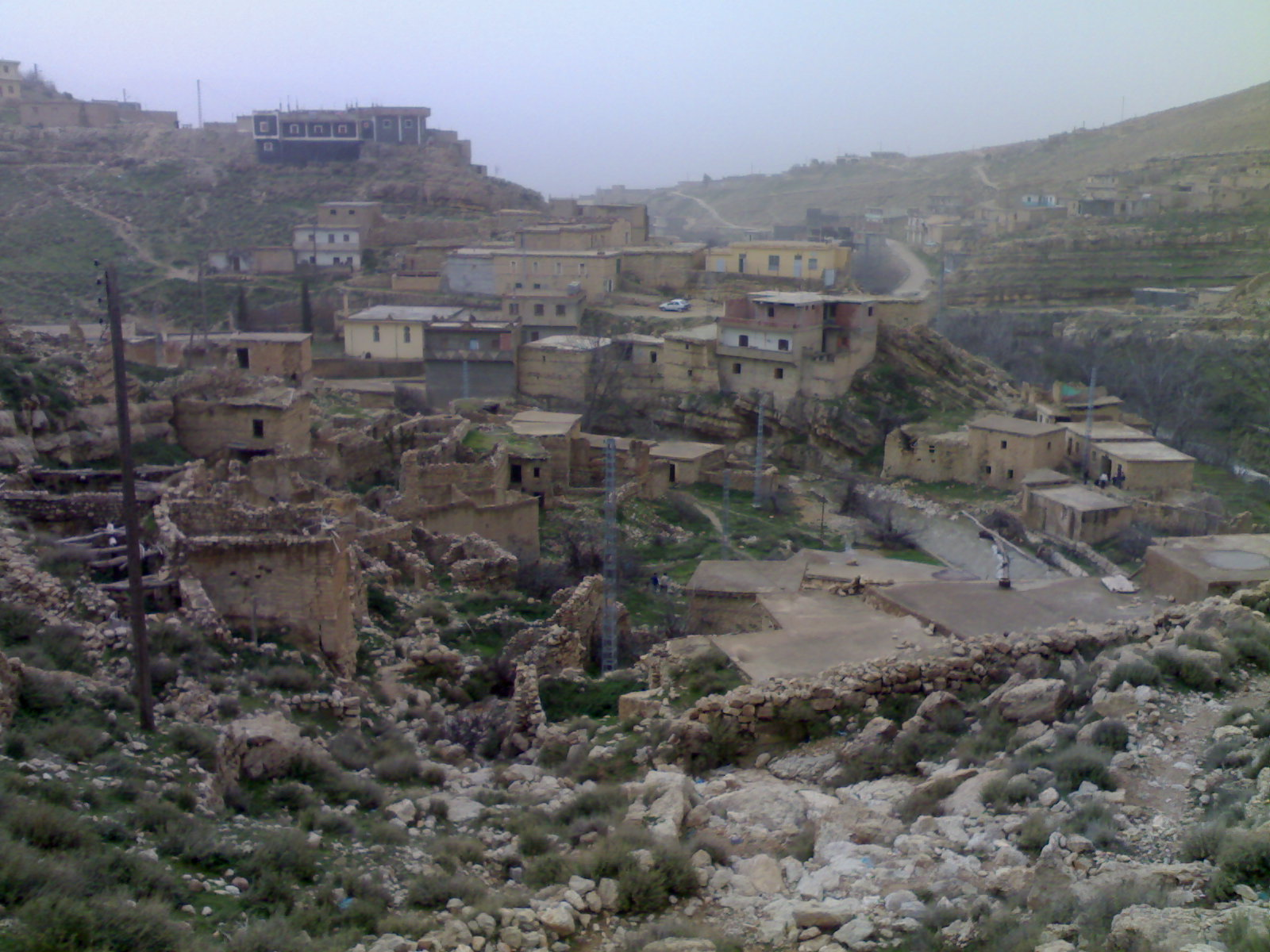 بوزينة القديمة